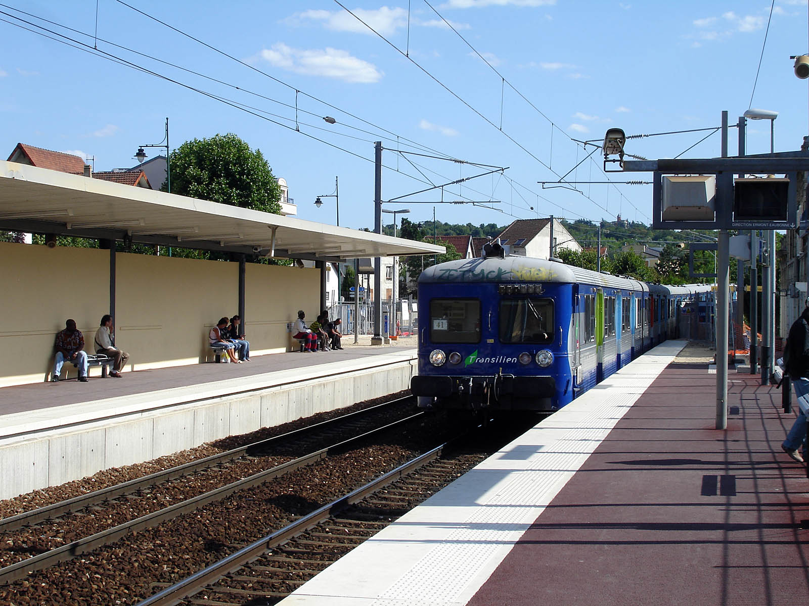 La gare de Sannois, Val-d'Oise, France.